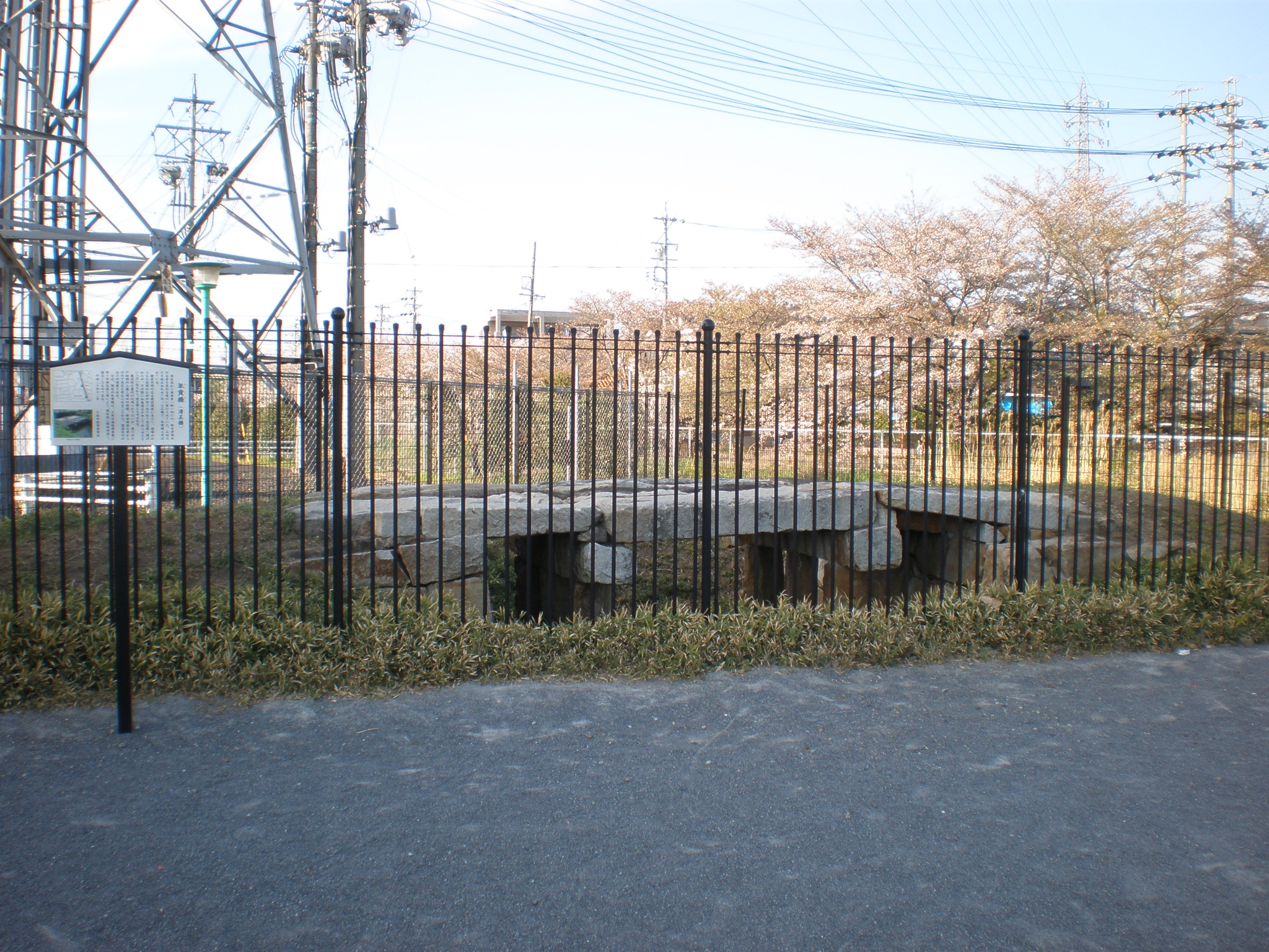 愛知県小牧市の原川にかつて架かっていた年貢橋